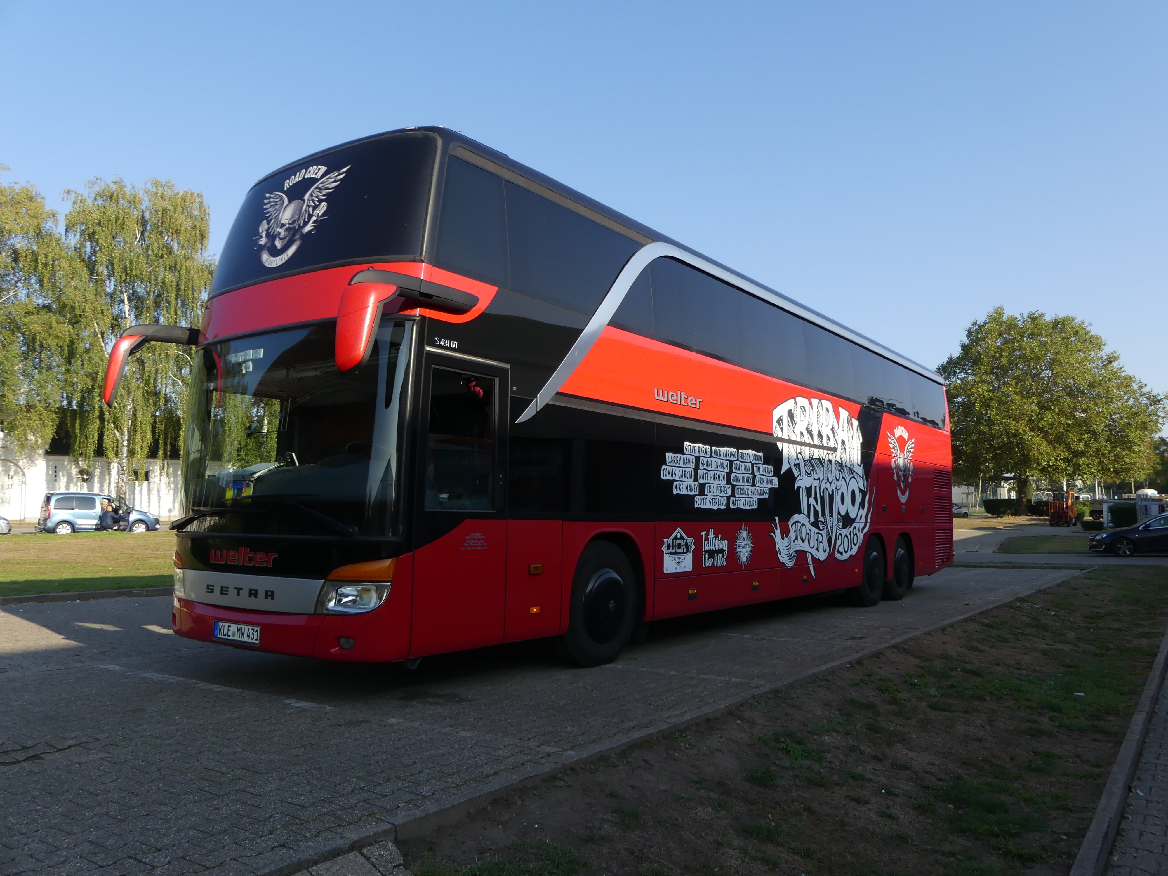 Bus der Tribal Tattoo Tour 2018, hier auf dem Parkplatz der Kaiserstadt Tattoo Expo in Aachen